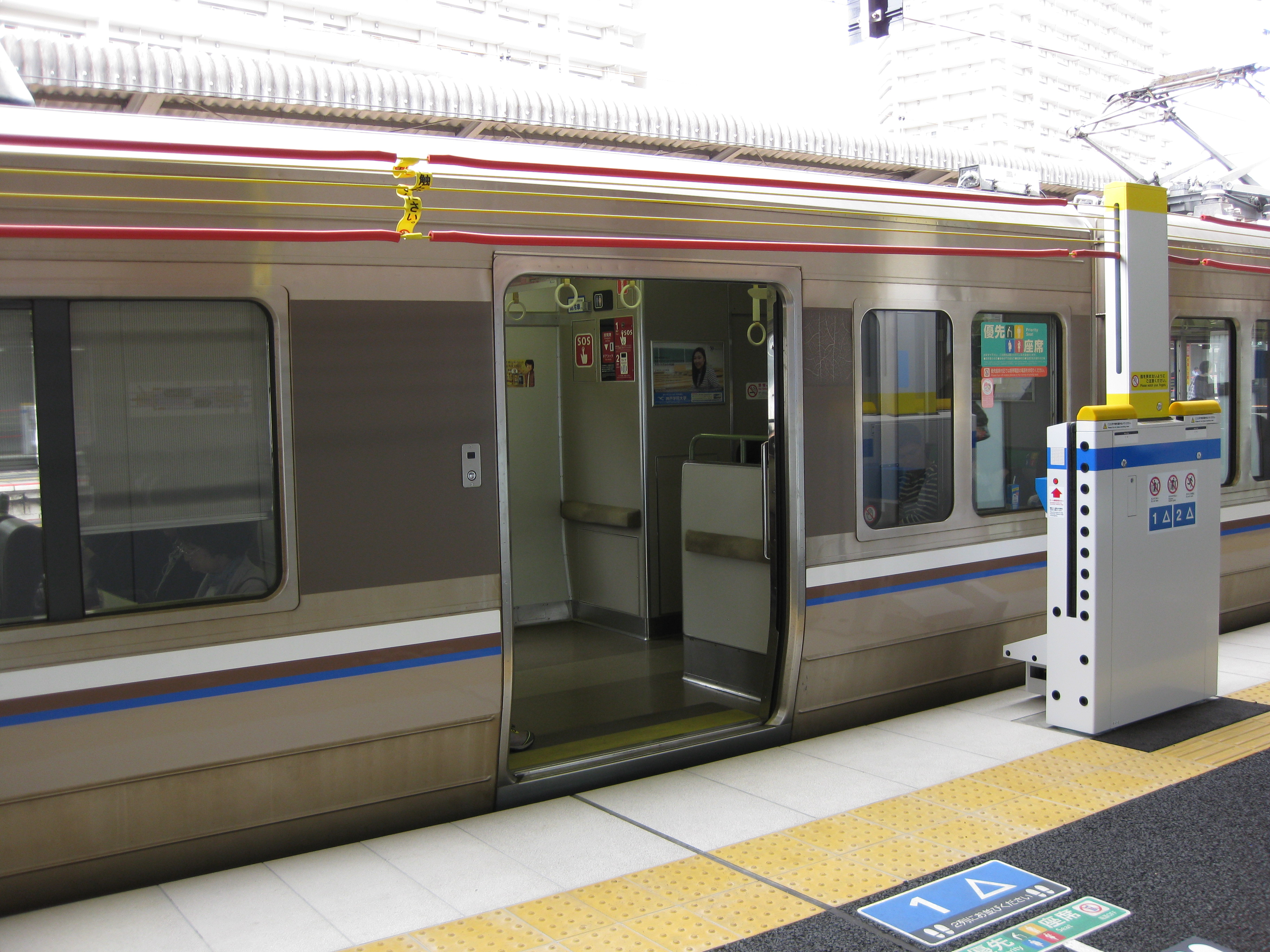 高槻駅新快速用プラットホームのホームドアが開いた状態